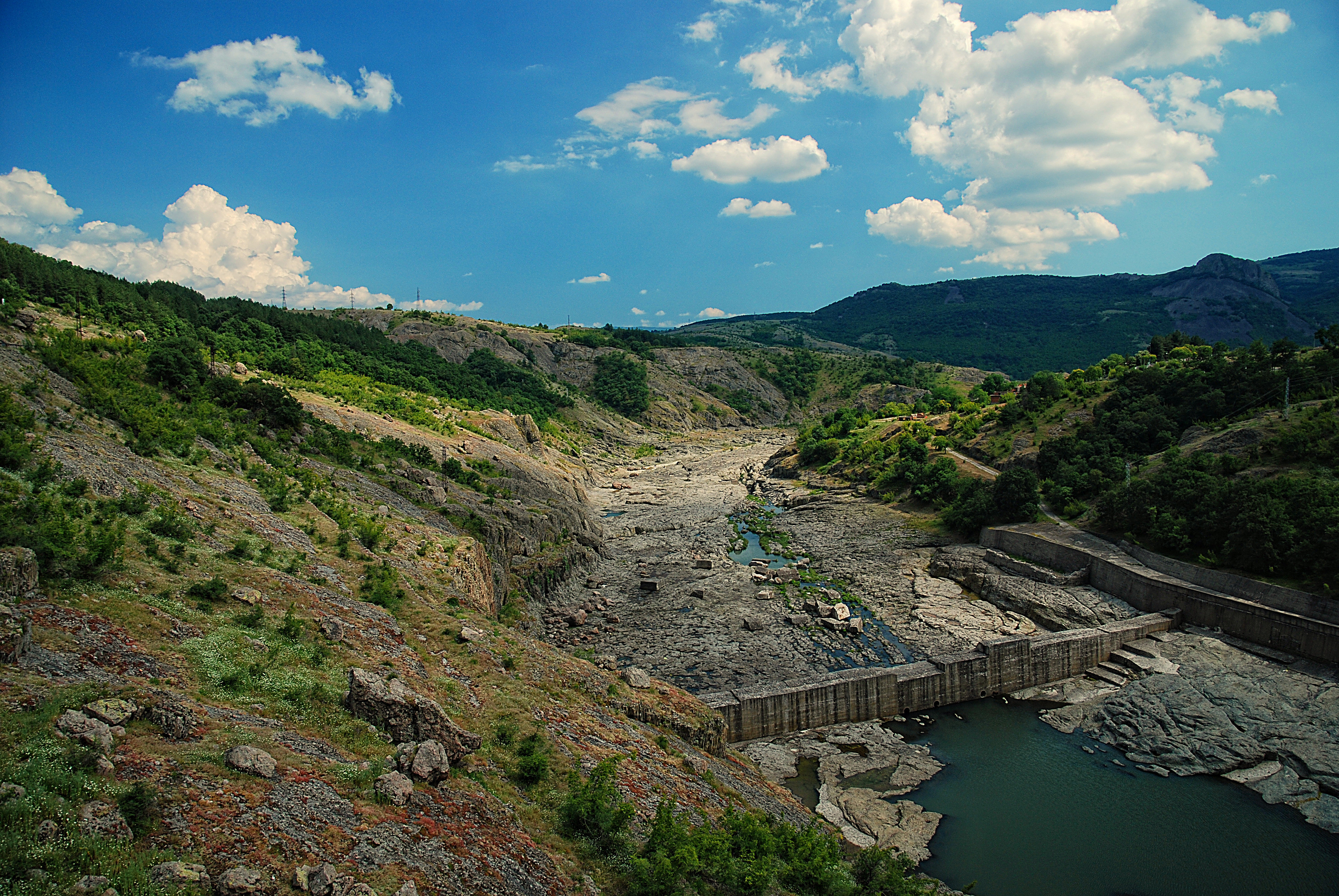 Вълчи дол